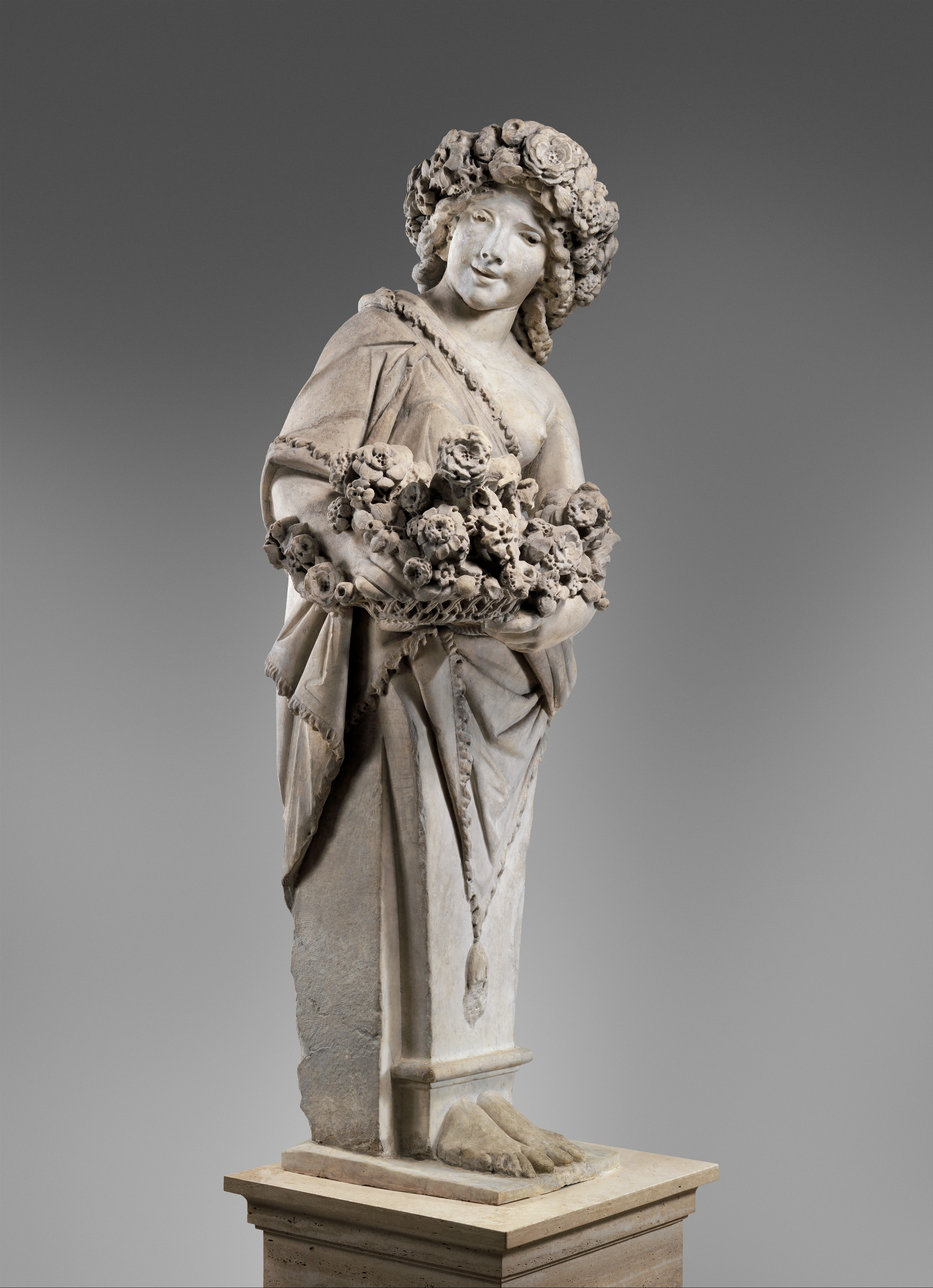 Italian, Rome; Term; Sculpture